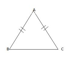 नेपाली: समद्विबाहु त्रिभुज